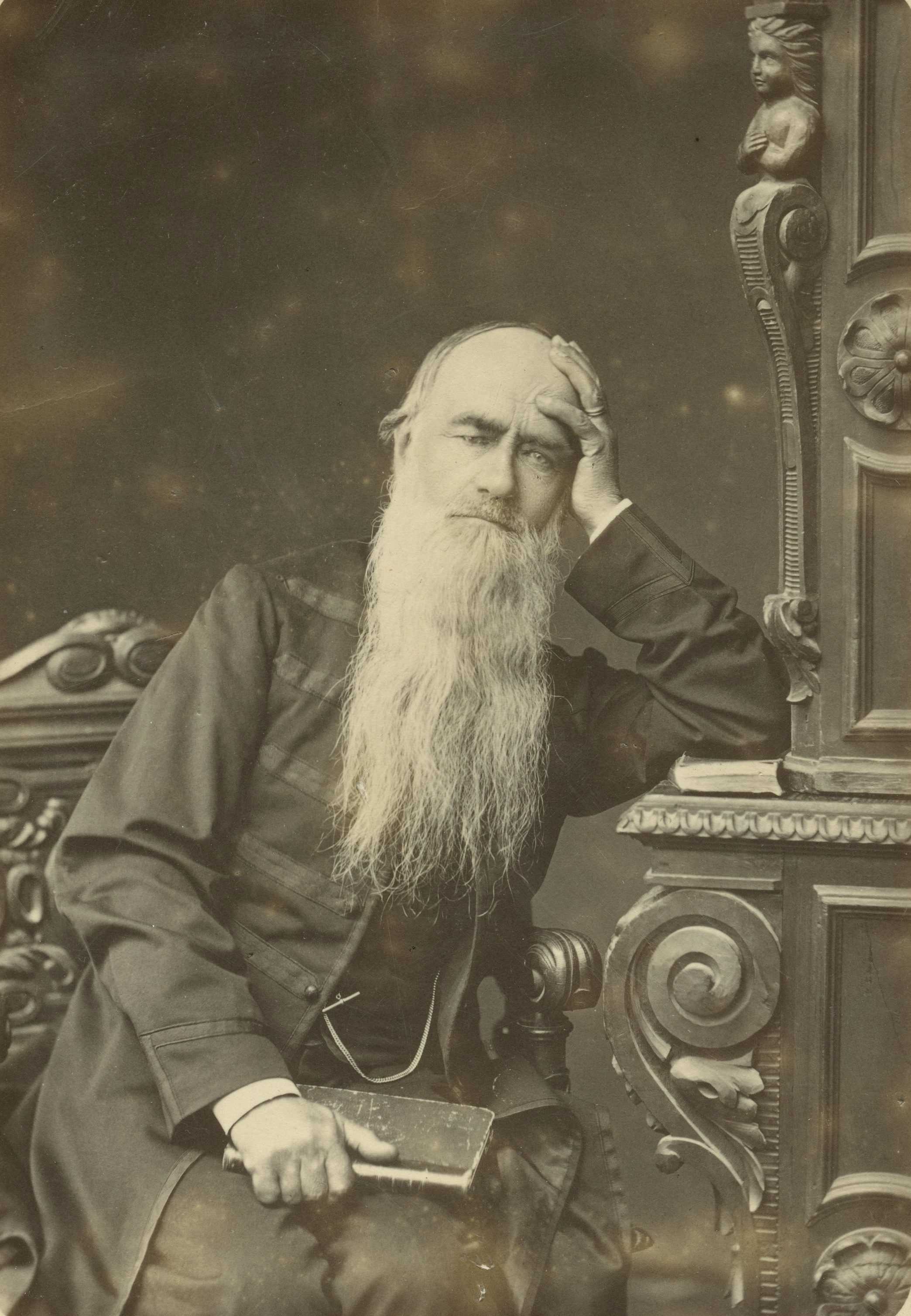 Portret Józefa Bohdana Zaleskiego